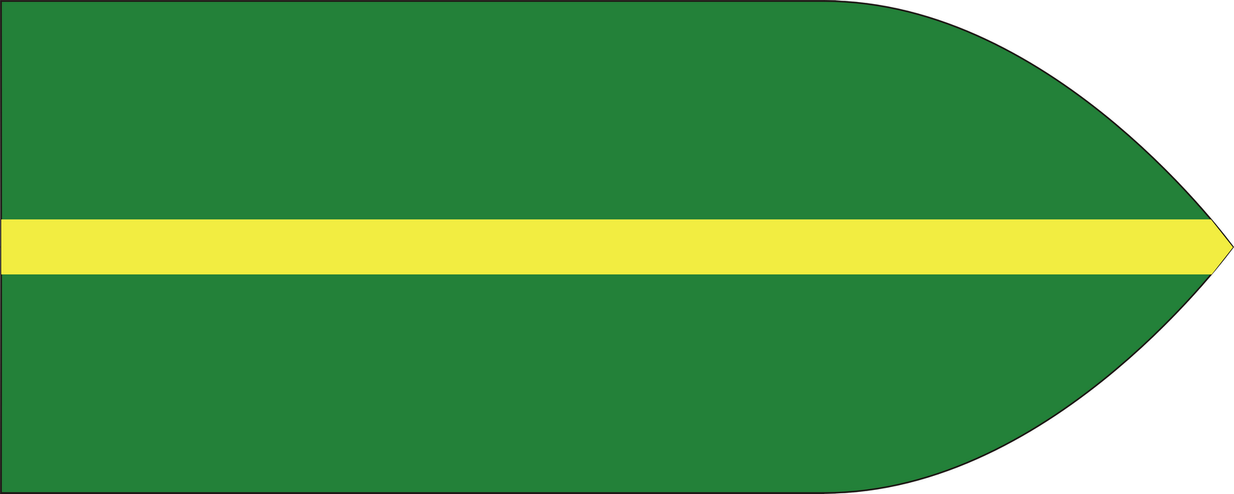 Barwy 4 Pułku Artylerii Przeciwlotniczej Polskich Sił Zbrojnych na Zachodzie